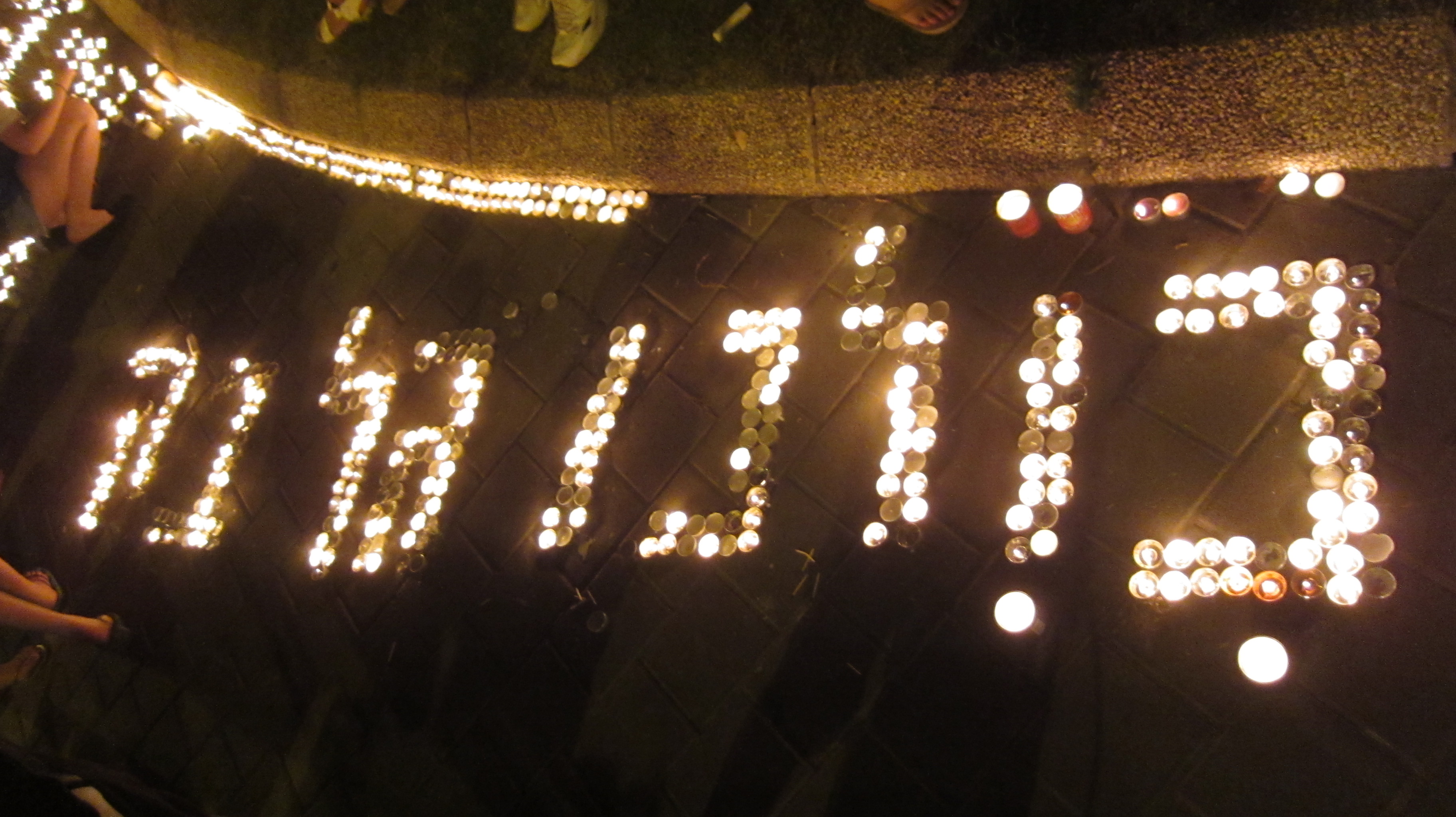 פרשת גל בק - מחאה שקטה בצומת קק"ל חיים לבנון ת"א - מקום התאונה 18.7.15